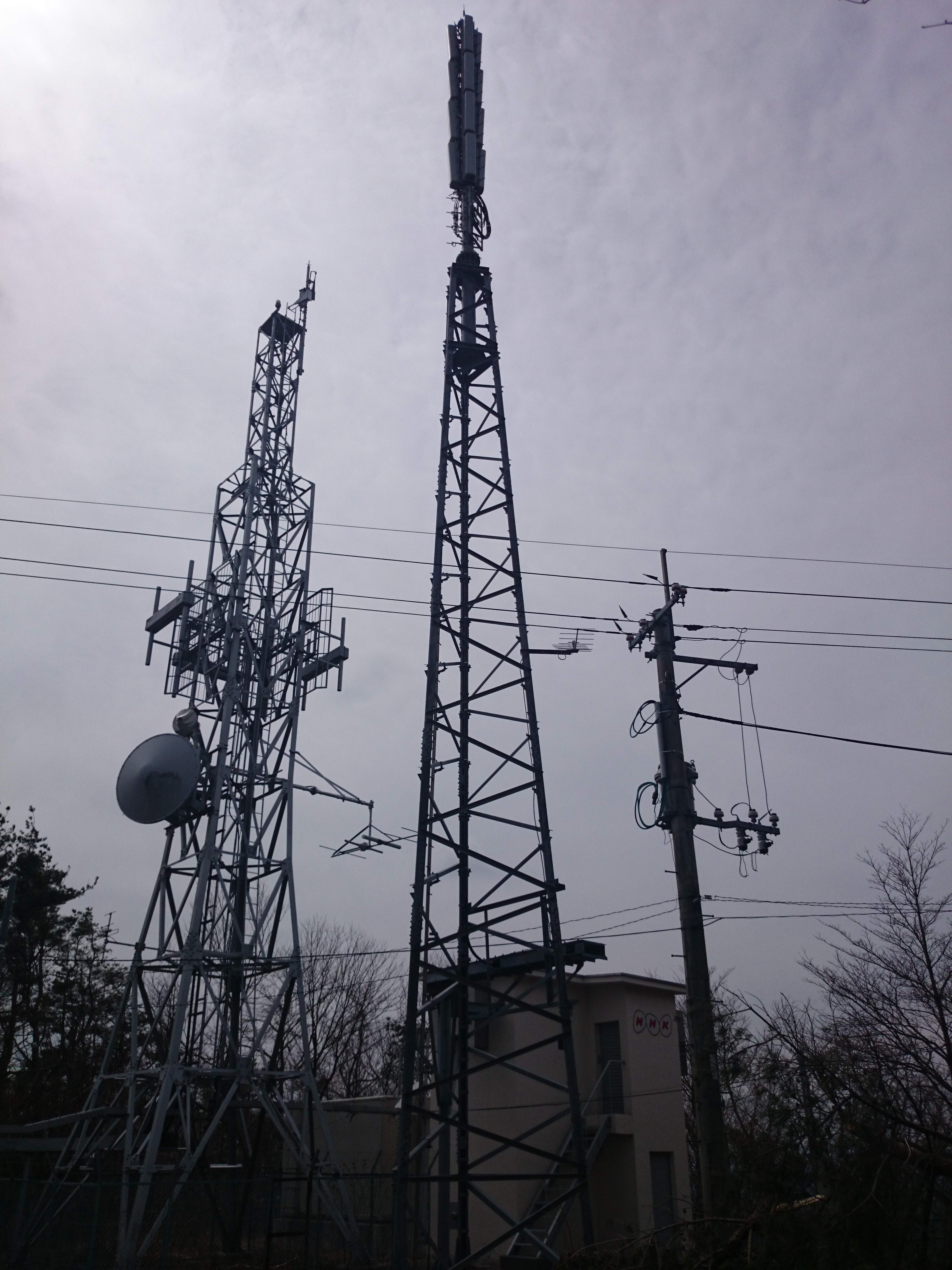 NHK一関テレビ・FM送信所